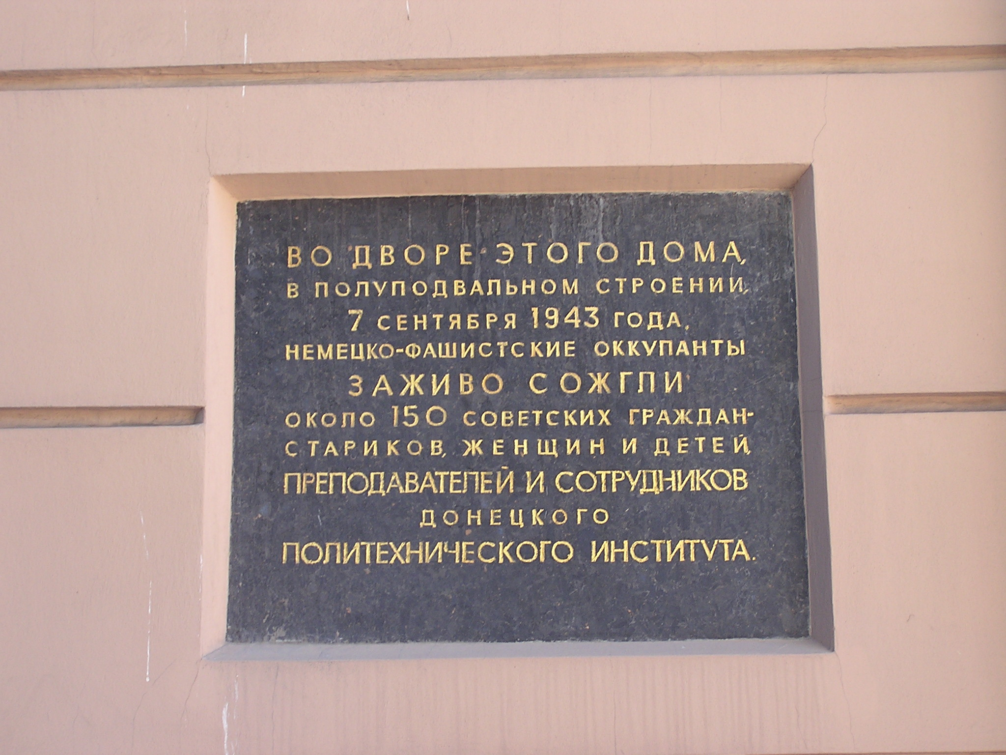 Мемориальная доска в Донецке